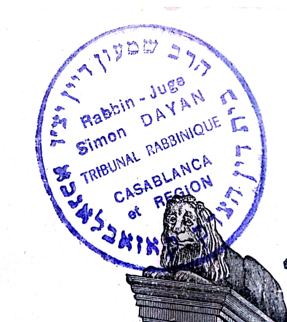 חתימה על ספריו